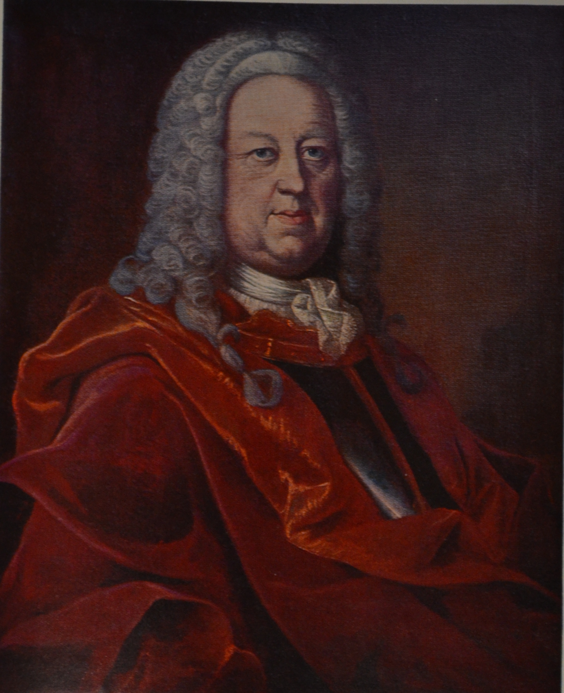 Hermann Riedesel Freiherr zu Eisenbach (1682-1745), 21. Erbmarschall der Landgrafschaft Hessen und Burggraf der Reichsburg Friedberg.